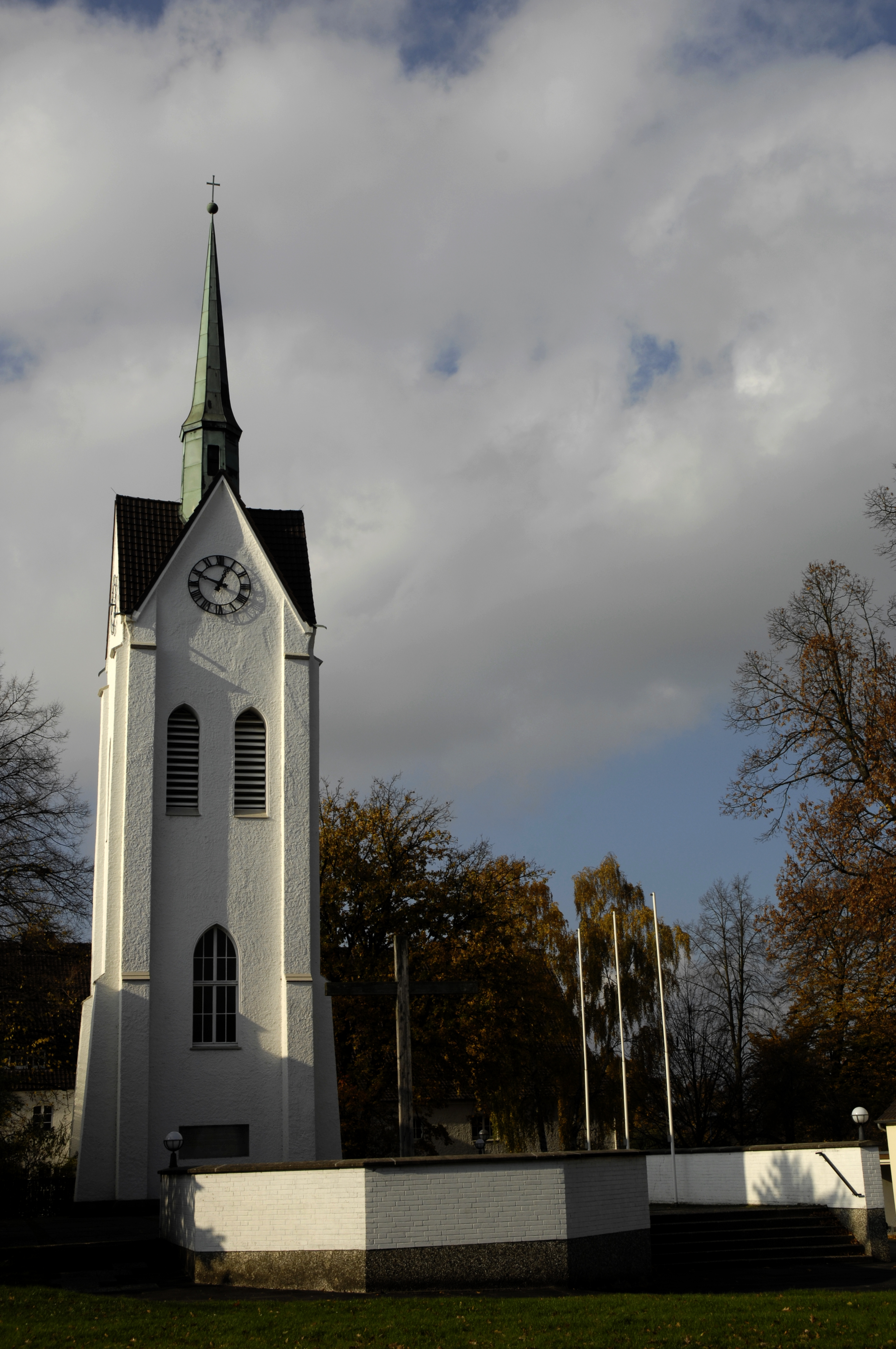 Löhne, ev. Kirche